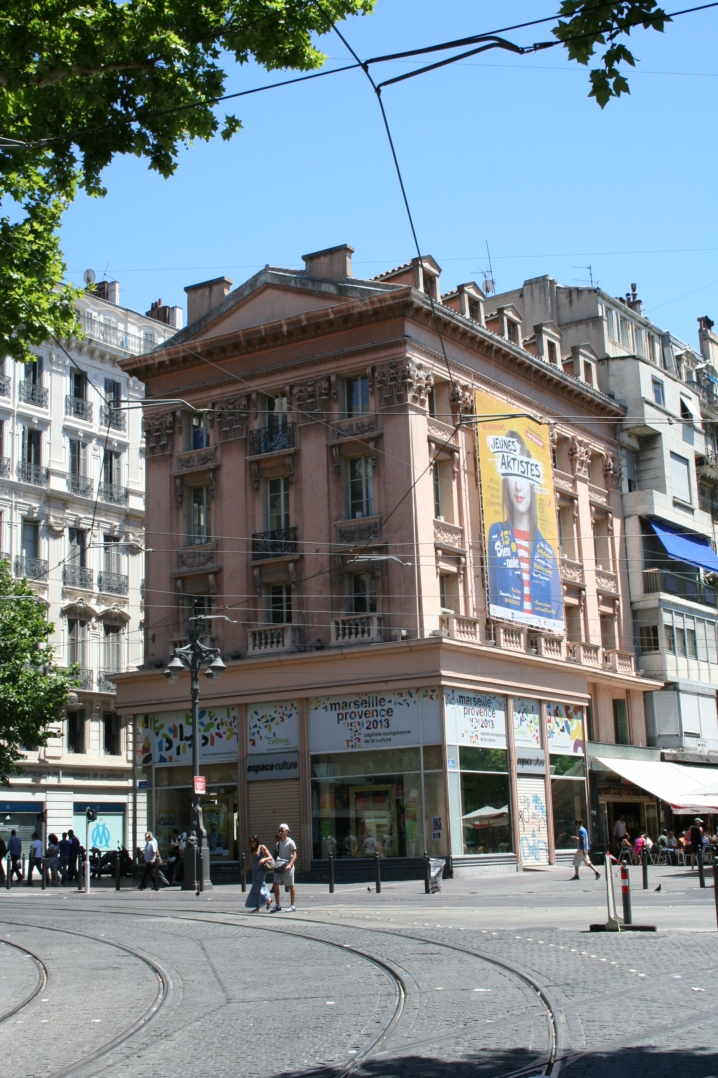 Maison du Figaro à Marseille située à l'angle de la Canebière et du cours Saint-Louis, inscrite monument historique.